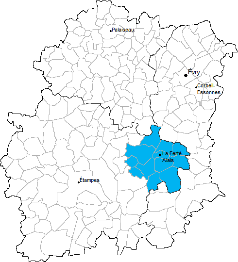 Carte de localisation du canton de La Ferté-Alais en Essonne (91)